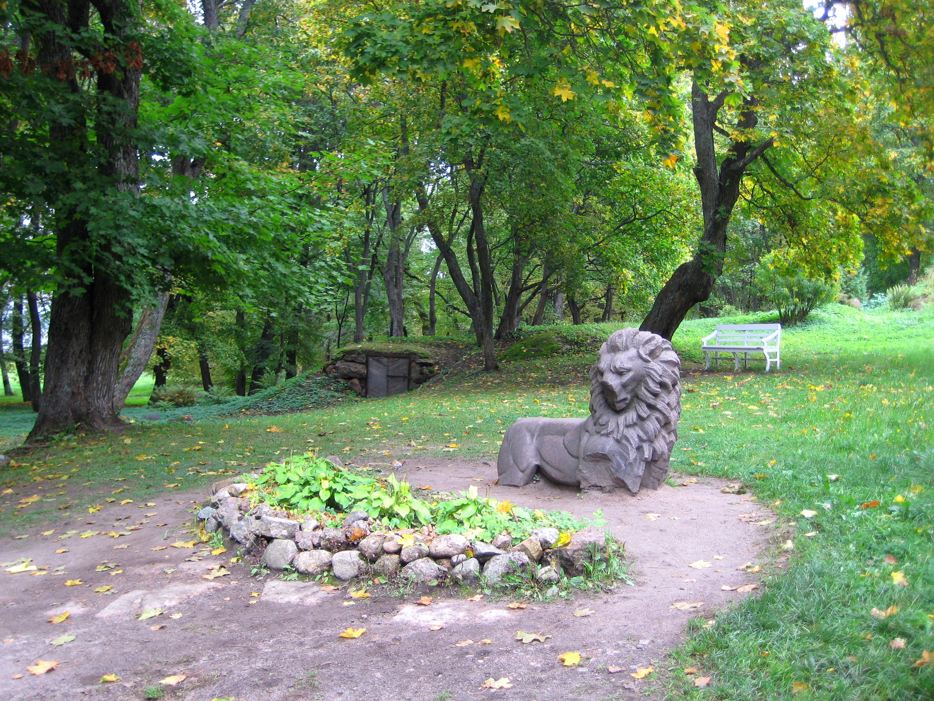 Выборг. Парк Монрепо. Фигура льва с памятника Независимости